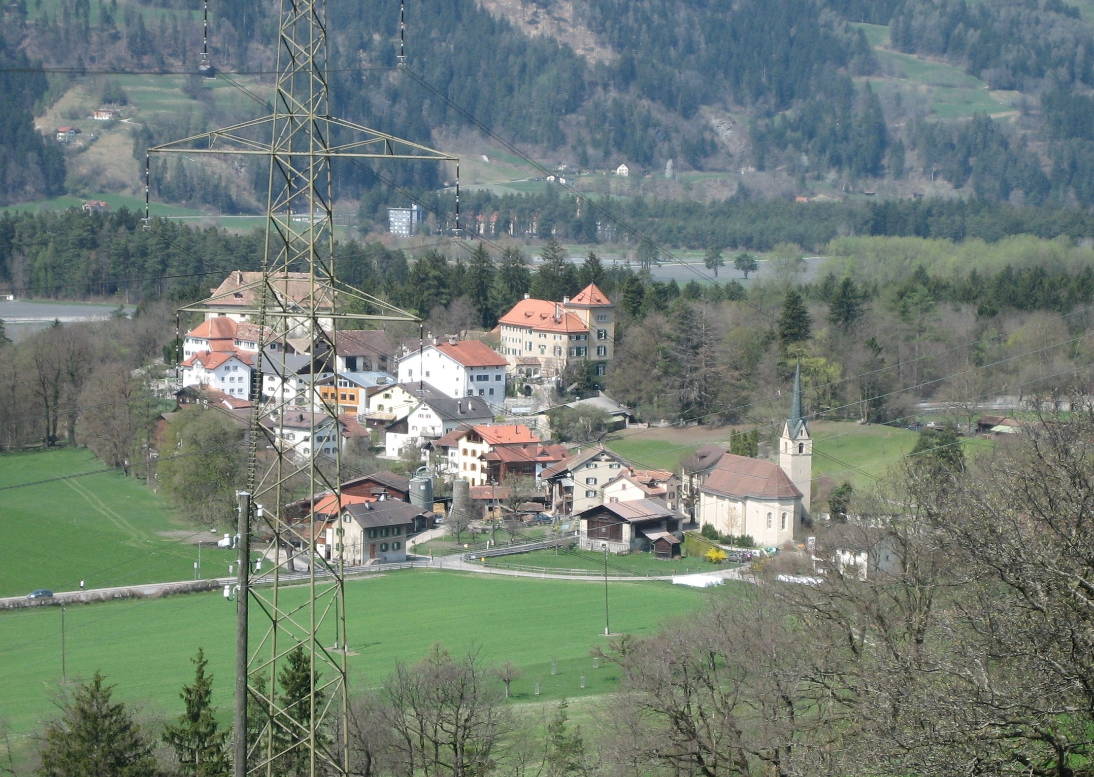 Fürstenau